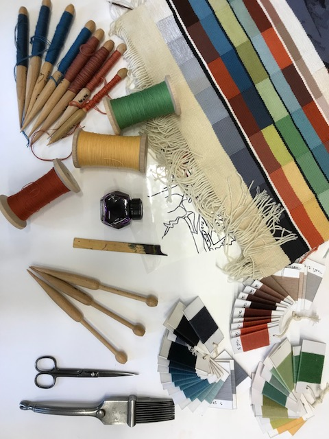 Nécessaire du licier à la manufacture des Gobelins, Paris (haute lice)